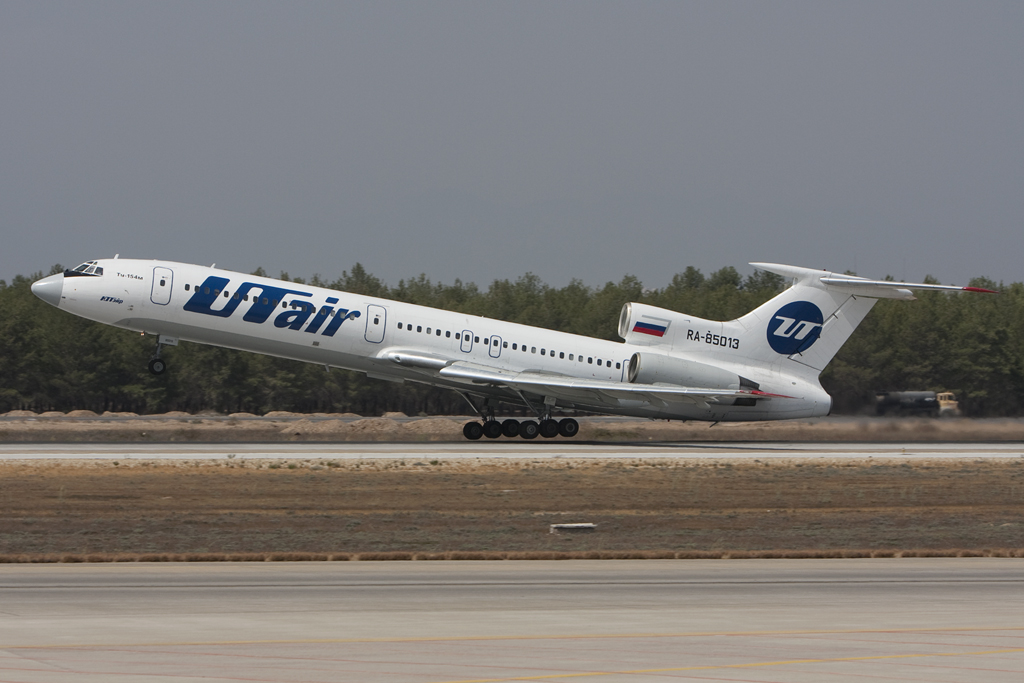 Antalya